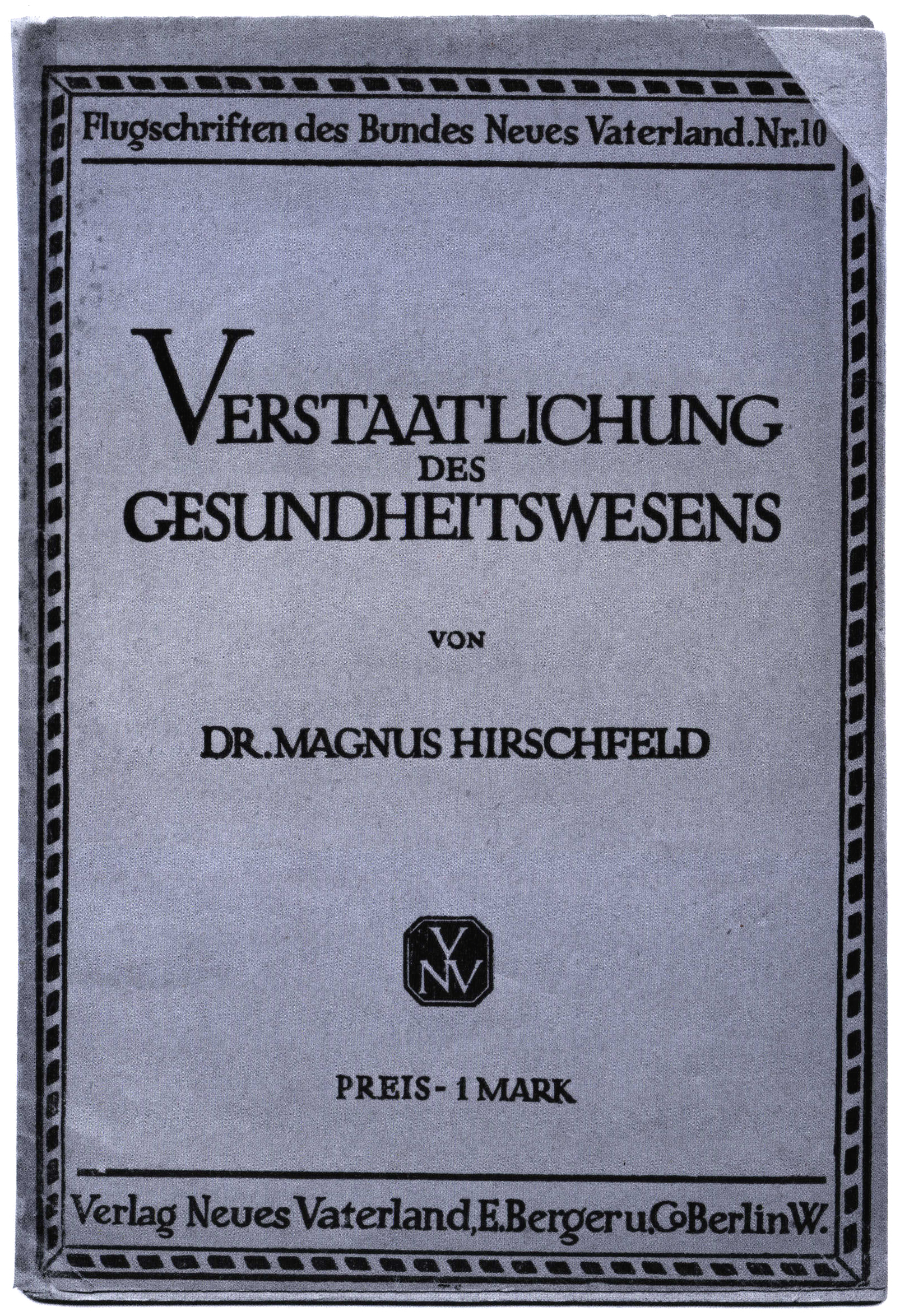 Titelblatt "Verstaatlichung des Gesundheitswesens" von Dr. Magnus Hirschfeld, Flugschriften des Bundes Neues Vaterland Nr. 10, Entwurf eines zu schaffenden Gesundheitsministeriums.